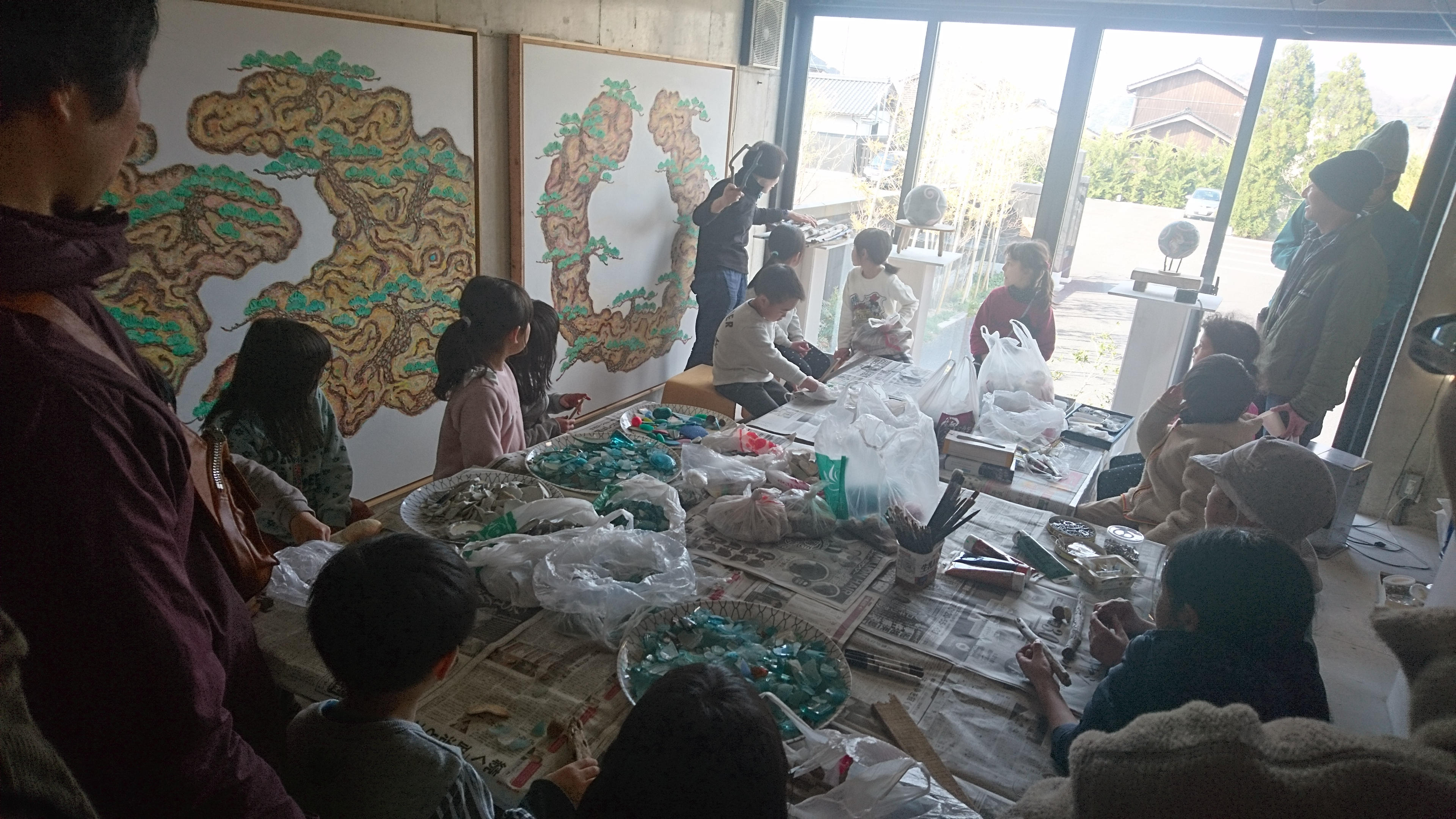 2019年3月24日に開催された漂着物ワークショップの様子。海岸を散策してシーグラスや流木などを拾い、アクリル絵の具で彩色するなどしてアクセサリーやオブジェなどに加工した。